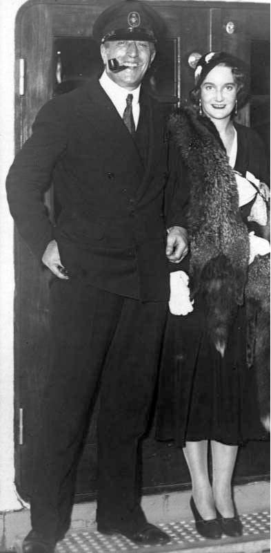 Graf Luckner aus Amerika zurück ! Graf Luckner, der berühmte Corvetten-Kapitän, welcher durch seine grossen Abenteuer zur See während des Weltkrieges viel von sich reden machte, ist mit seiner jungen Gattin nach einer erfolgreichen Vortrags-Turneé in Amerika wieder in Deutschland eingetroffen.